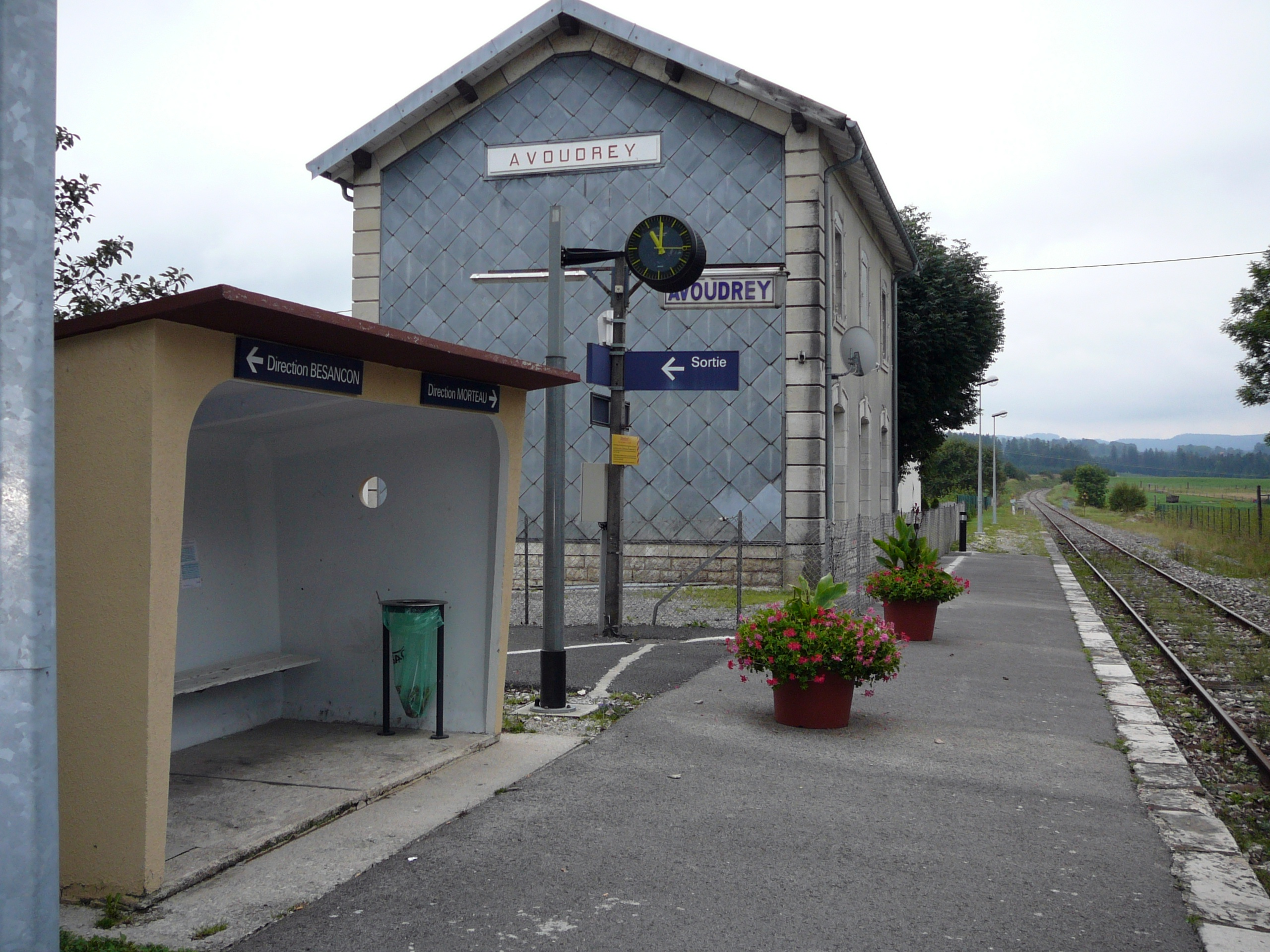 Gare d'Avoudrey direction Morteau